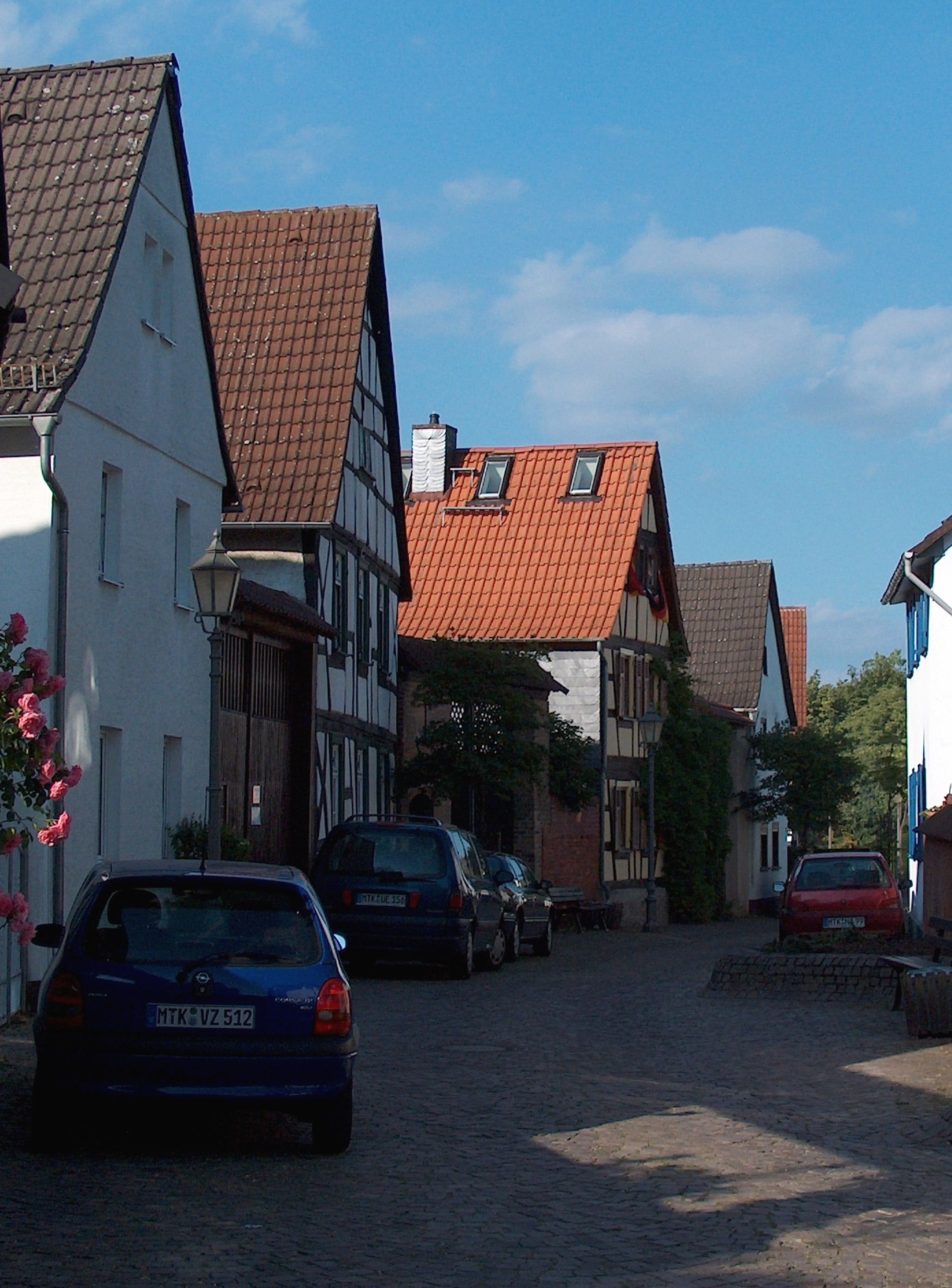 en.: view of the street Alte Königsteiner Straße at Kelkheim-Münster, Germany. dt.: Blick in die Alte Königsteiner Straße in Kelkheim-Münster, Hessen.